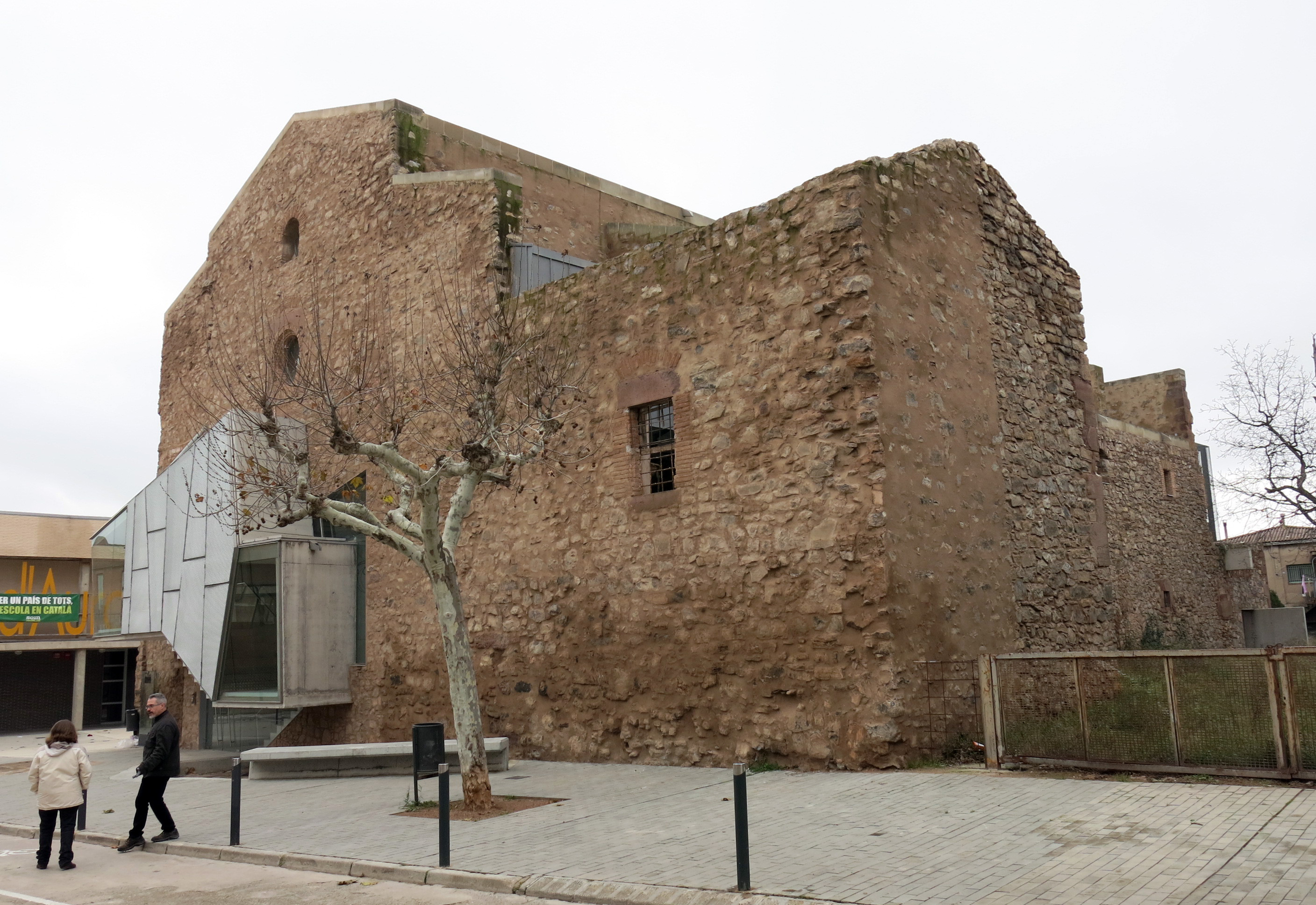 Convent de Sant Francesc (Santpedor)